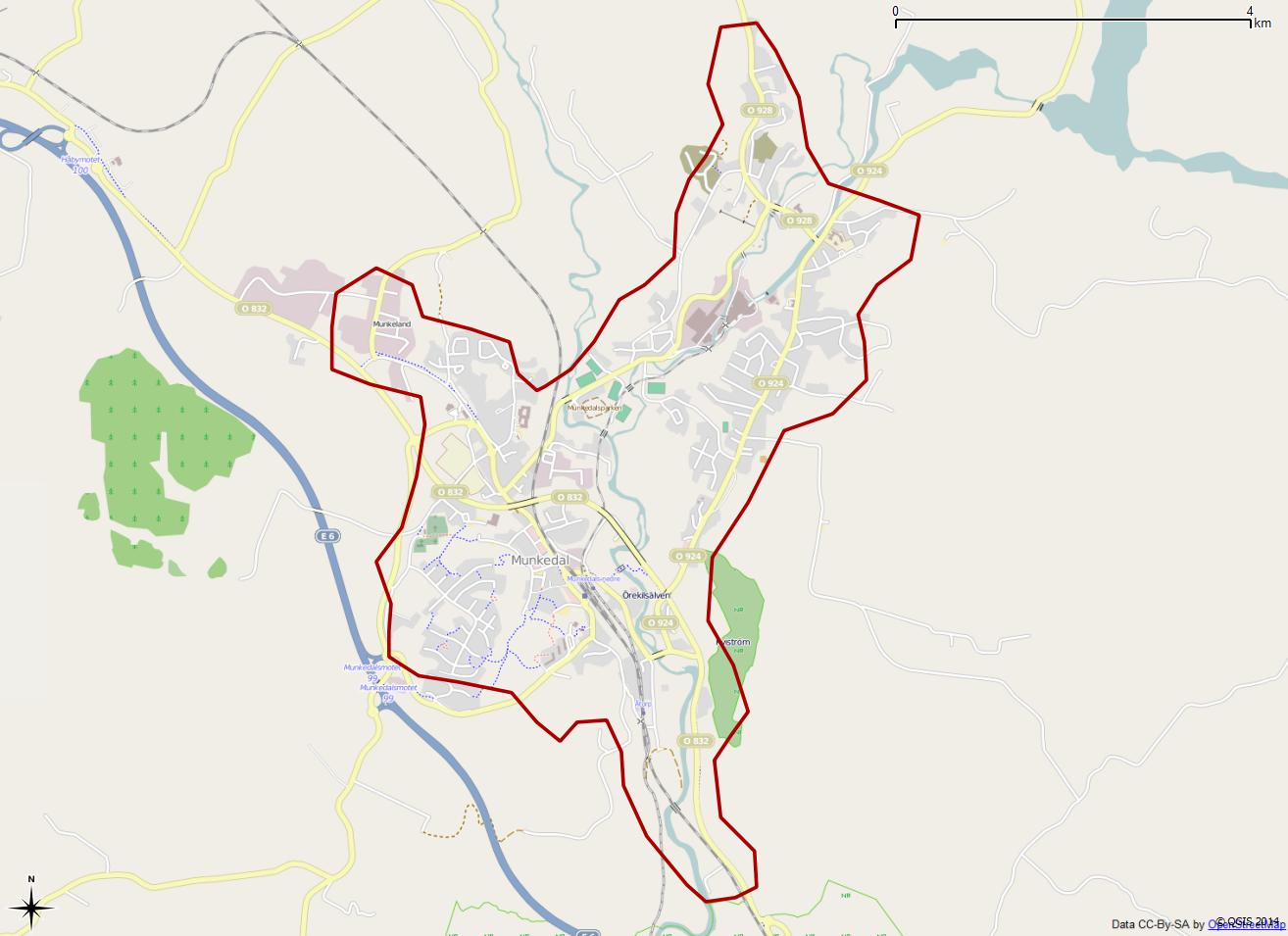 Tätorten Munkedals gränser 1990 enligt Atlas över rikets indelningar 1992.